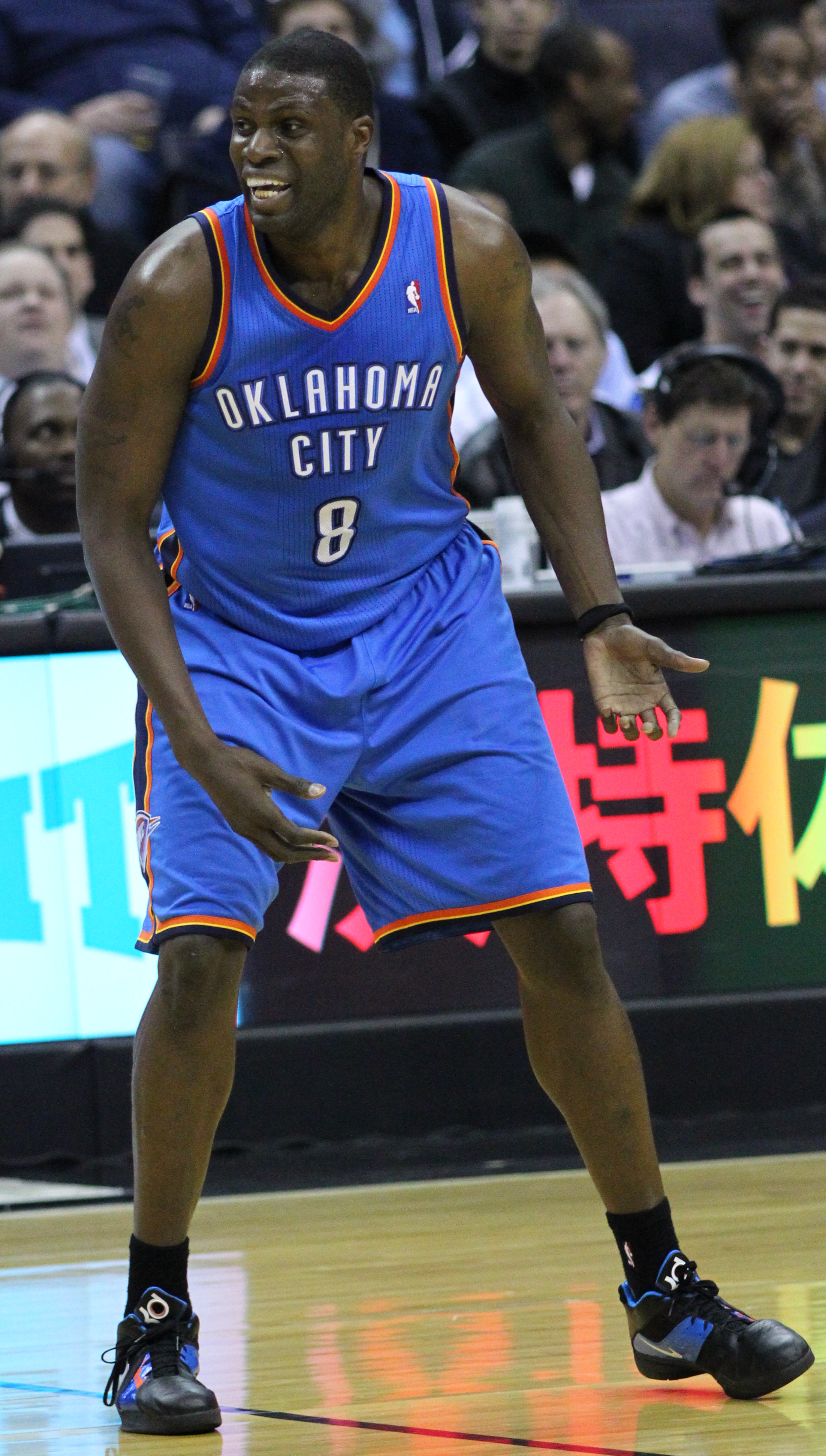 Wizards v/s Thunder 03/14/11